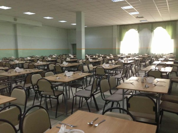 Асхана